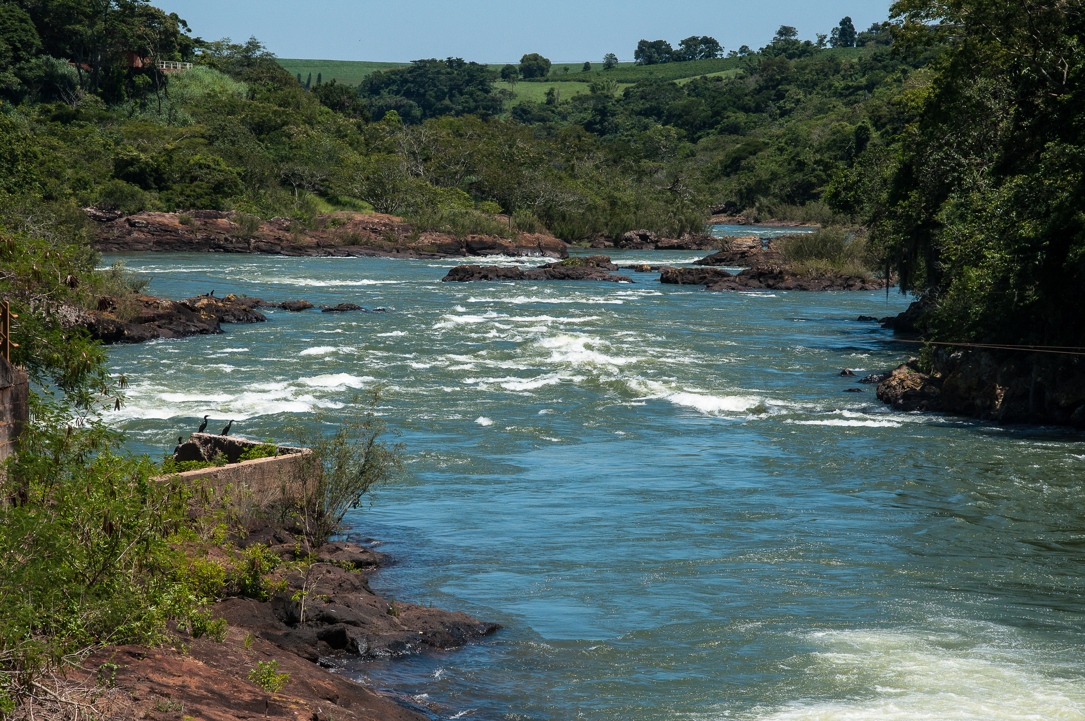 O rio Paranapanema é um dos rios mais importantes do interior do estado de São Paulo. Ele é um divisor natural dos territórios dos Estados de São Paulo e Paraná. Com uma extensão de 929 km em um desnível de 570m o Paranapanema é o rio menos poluído do estado de São Paulo. A foto abaixo foi feita em Piraju no trecho das corredeiras do Rio Paranapanema